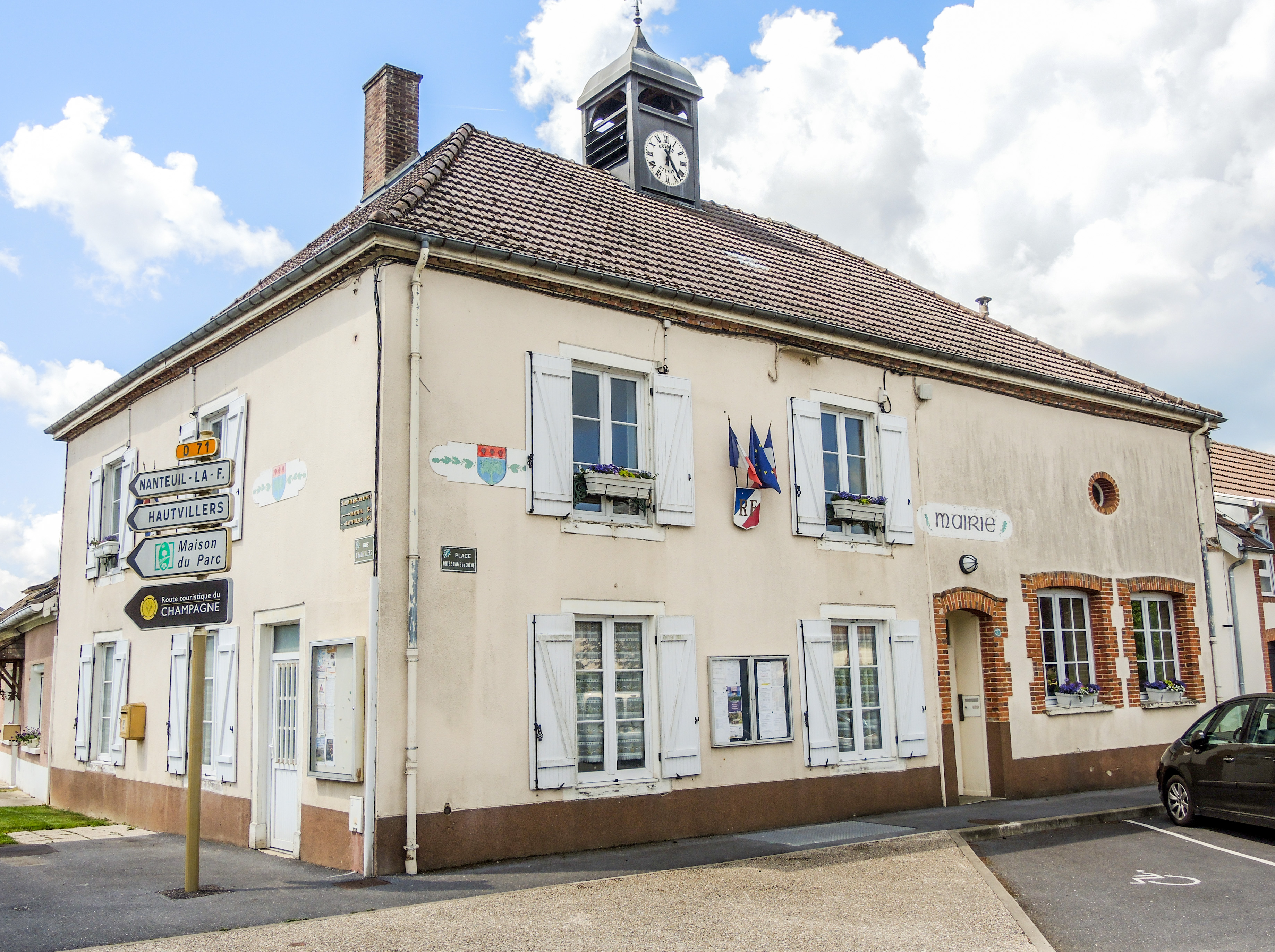 Façade de la mairie de saint-Imoges. Marne